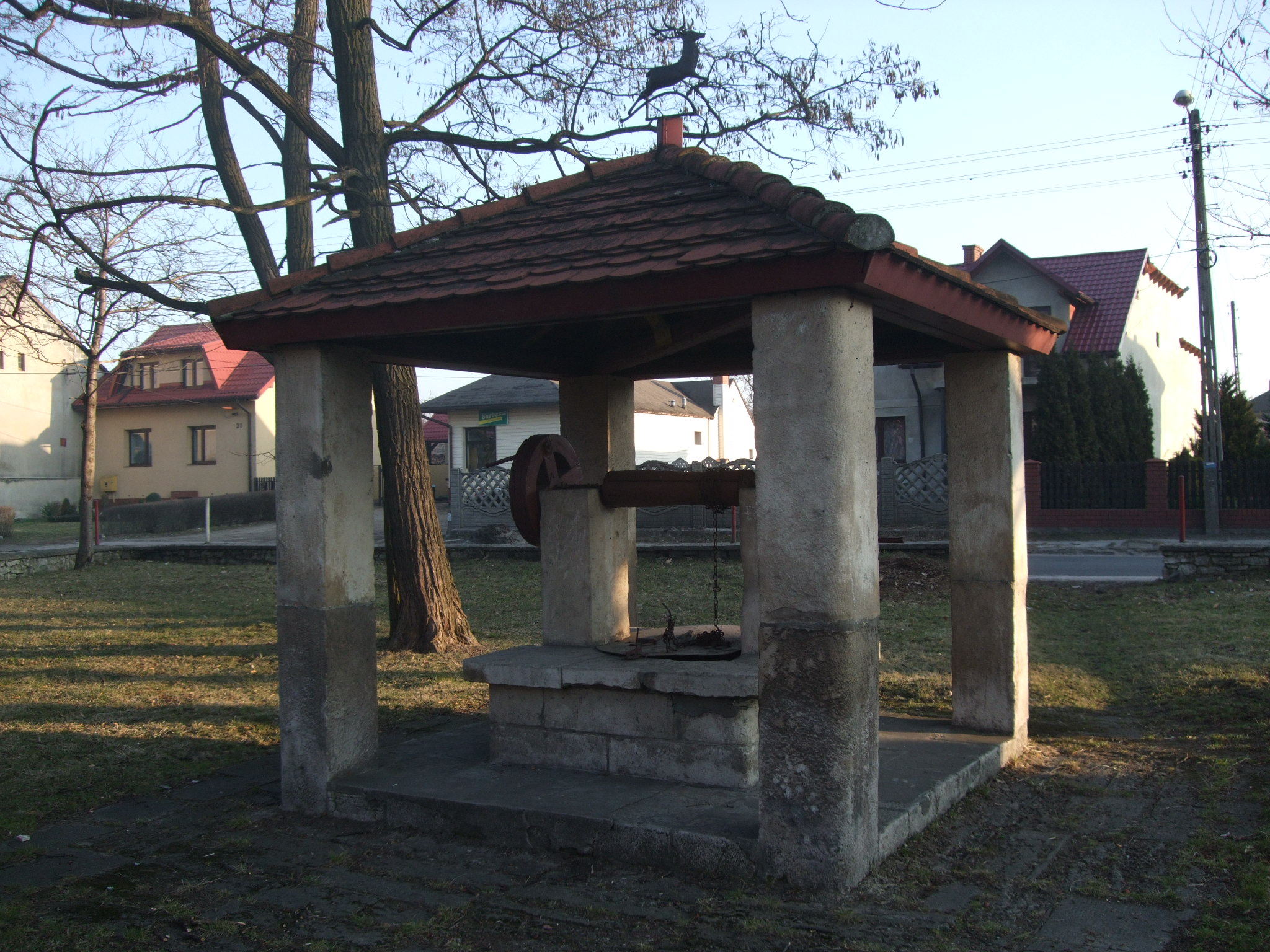 XVII-wieczna studnia w Jaworznie Jeleń.